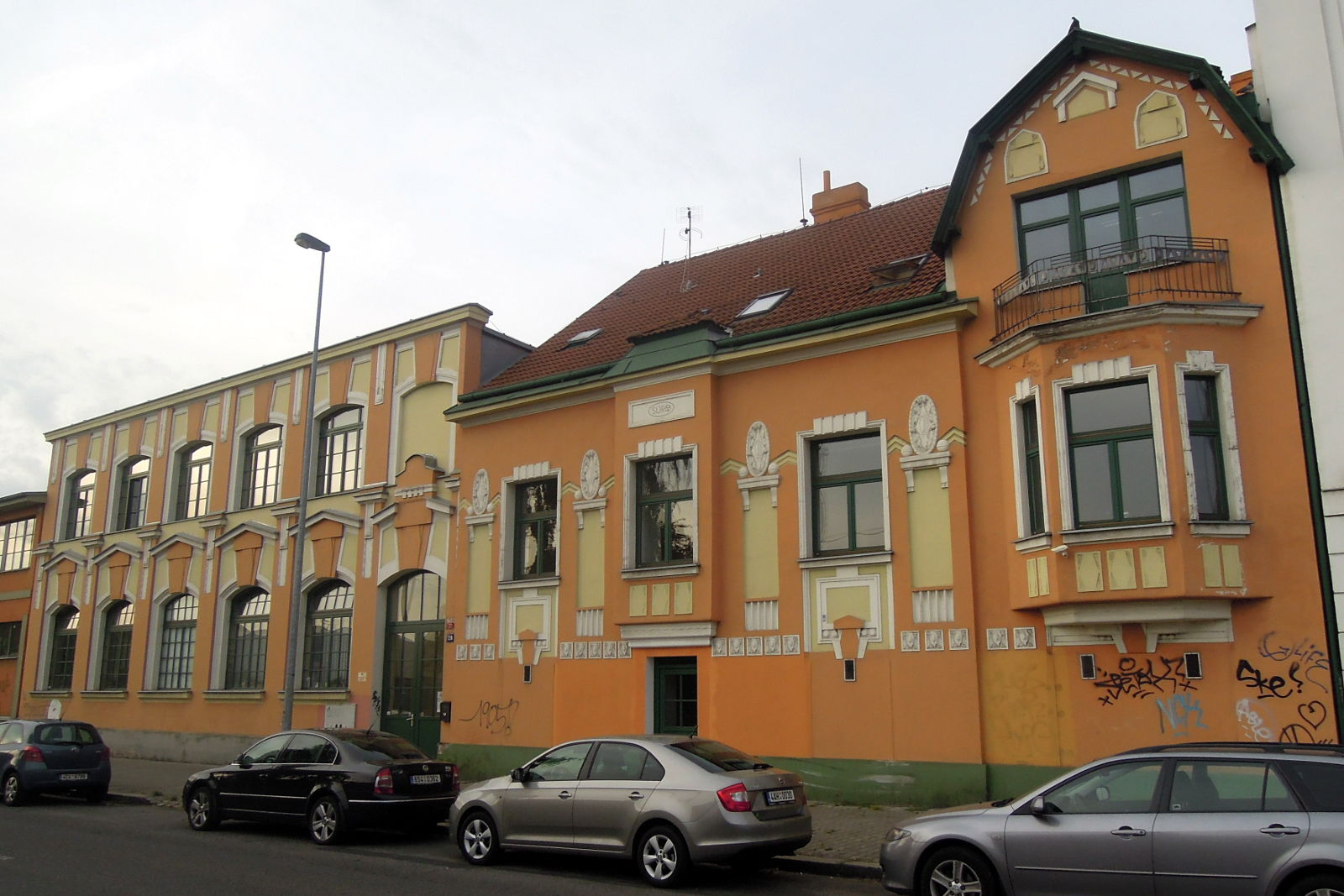 SÚRO v.v.i hlavní budova v ulici Bartoškova, Praha 4, Nusle